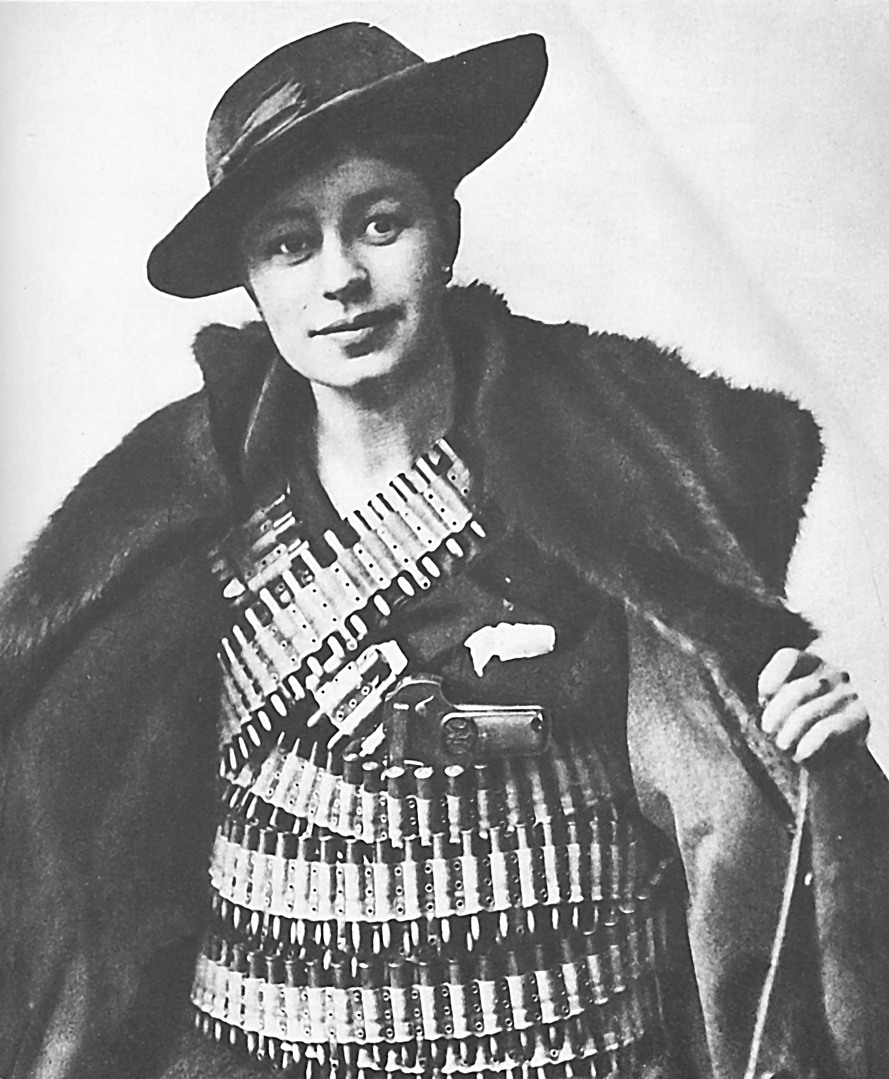 Punaisten miehittämän Helsingin suojeluskuntien ase- ja ammustäydennyksestä piti huolen esimerkiksi korkeakouluopiskelija neiti Verna Erikson kuvassa esitetyllä tavalla, jossa hän salakuljetti suojeluskunnile pistoolin ja 1350 konekiväärin patruunaa.